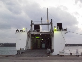 新さつま貨物船ライナーフェリー積み込み前